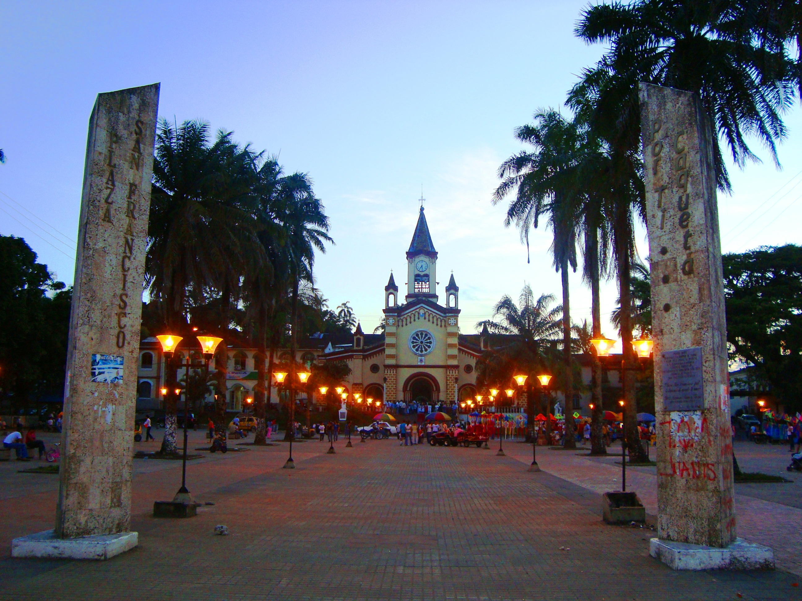 Catedral Nuestra Señora de Lourdes de Florencia (Caquetá) en la Plaza San Francisco de Asís al aterdecer.